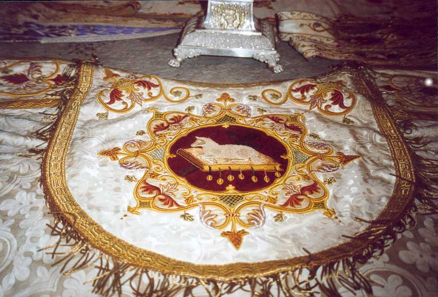 Chasuble brodée, église Saint Mansuy Fontenoy-le-Château